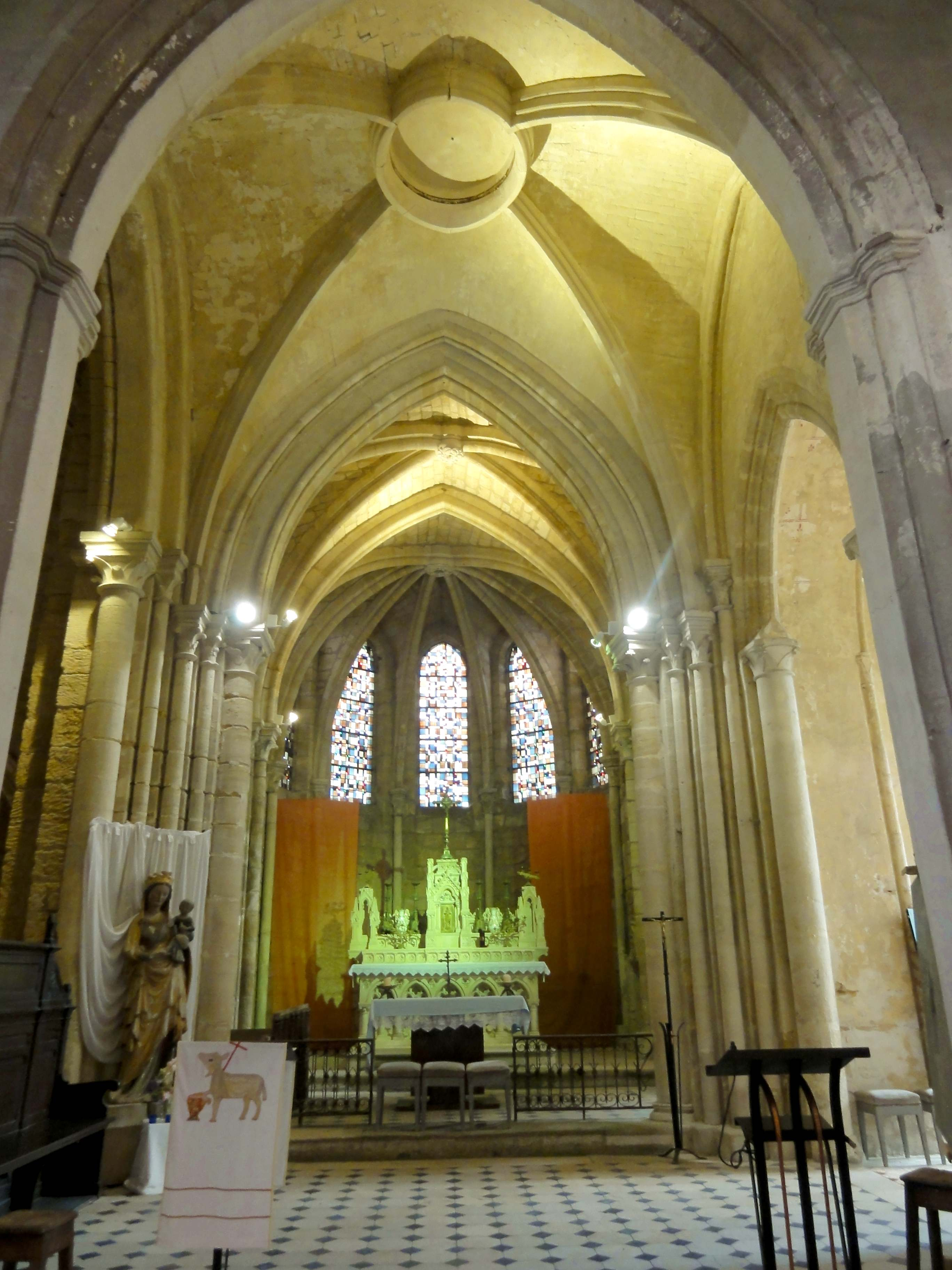 Intérieur de l'église - voir titre.